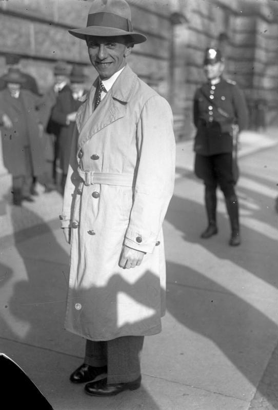 Der Propagandachef der Nationalsozialisten für die kommende Reichspräsidentenwahl ! Dr. Goebbels, der Reichs-Propagandachef der Nationalsozialisten für die Reichspräsidentenwahl.